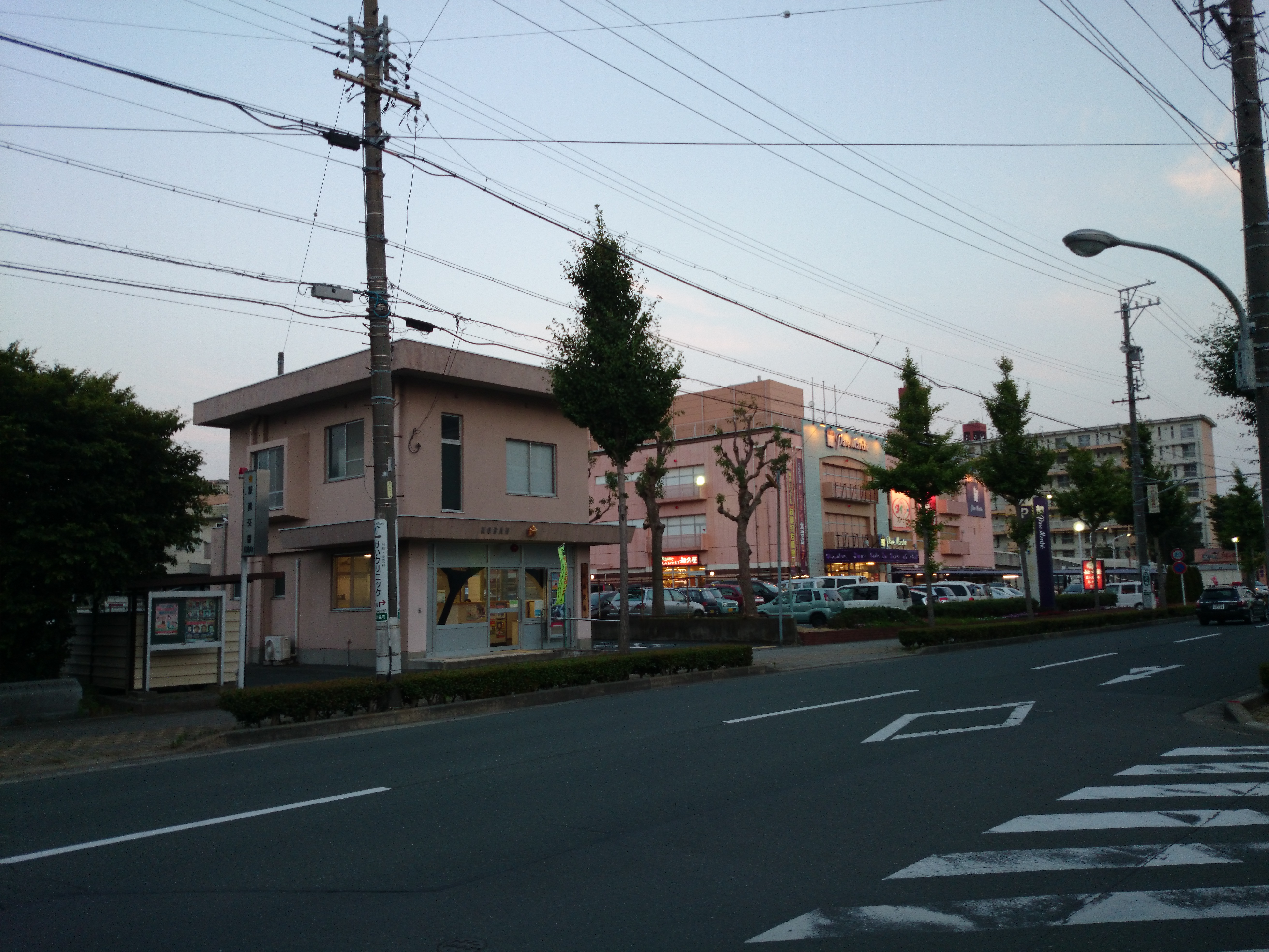 静岡県立浜松工業高等学校（移転前跡地） 現在の様子